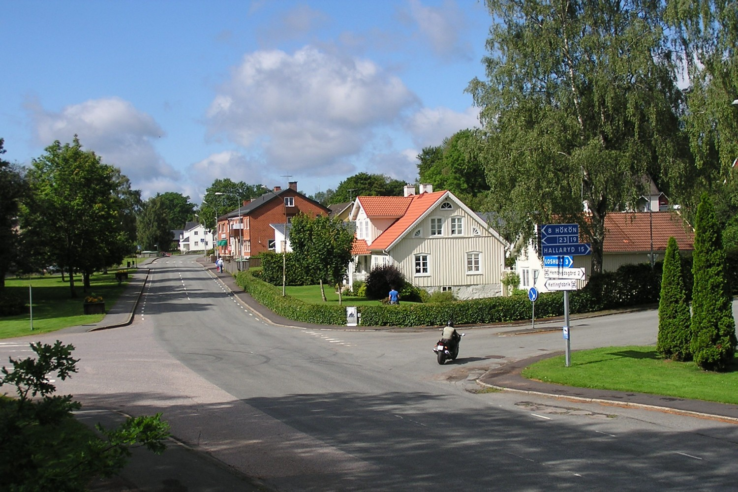 Killeberg: Storgatan söderut 31 juli 2017